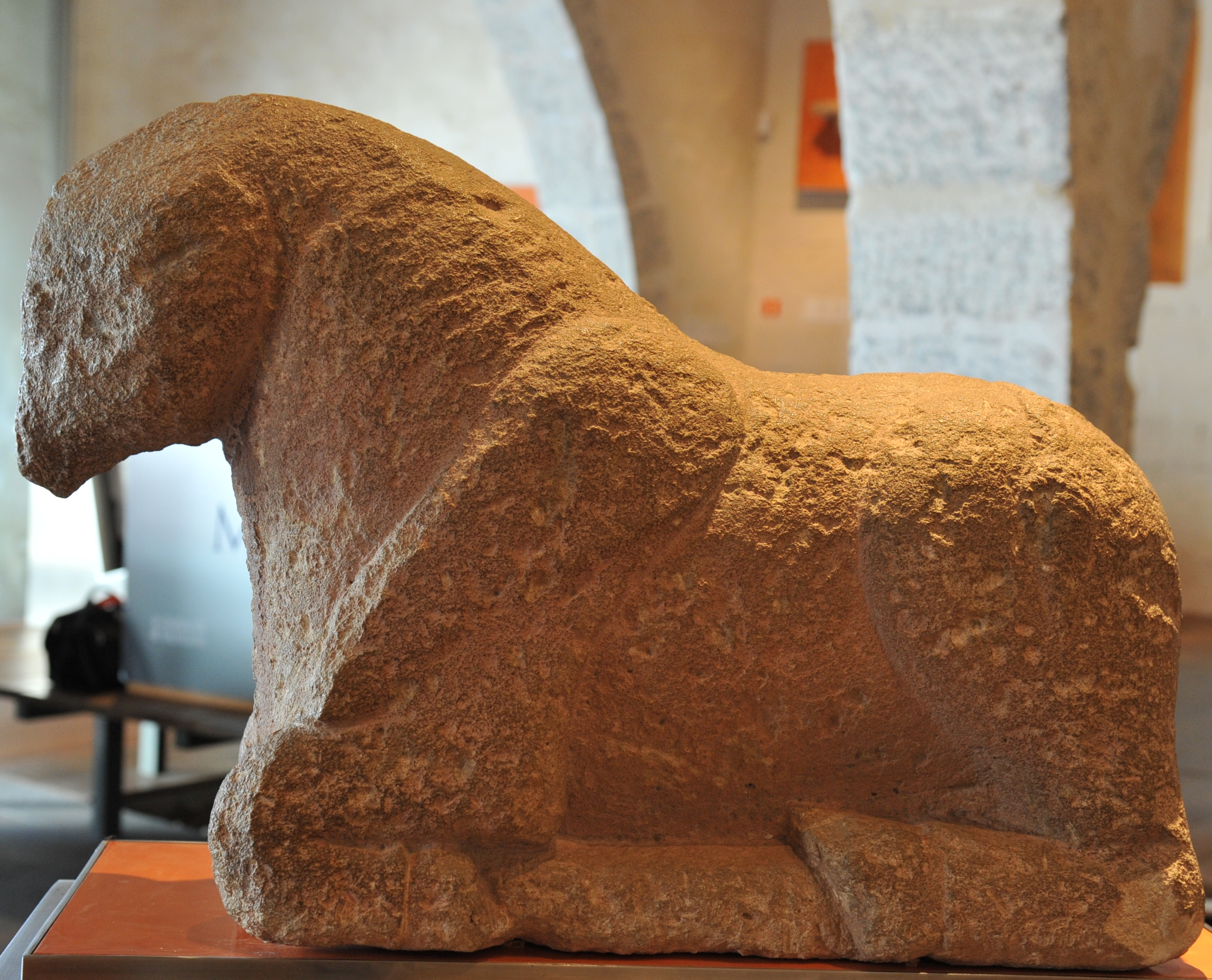 Escultura de bou. Època ibèrica. Segle IV aC. Partida d'El Terrrer, Montíber. Troballa casual, 1930. Procedència desconeguda. Museu Arqueològig de Sagunt. Inv. S.16.21